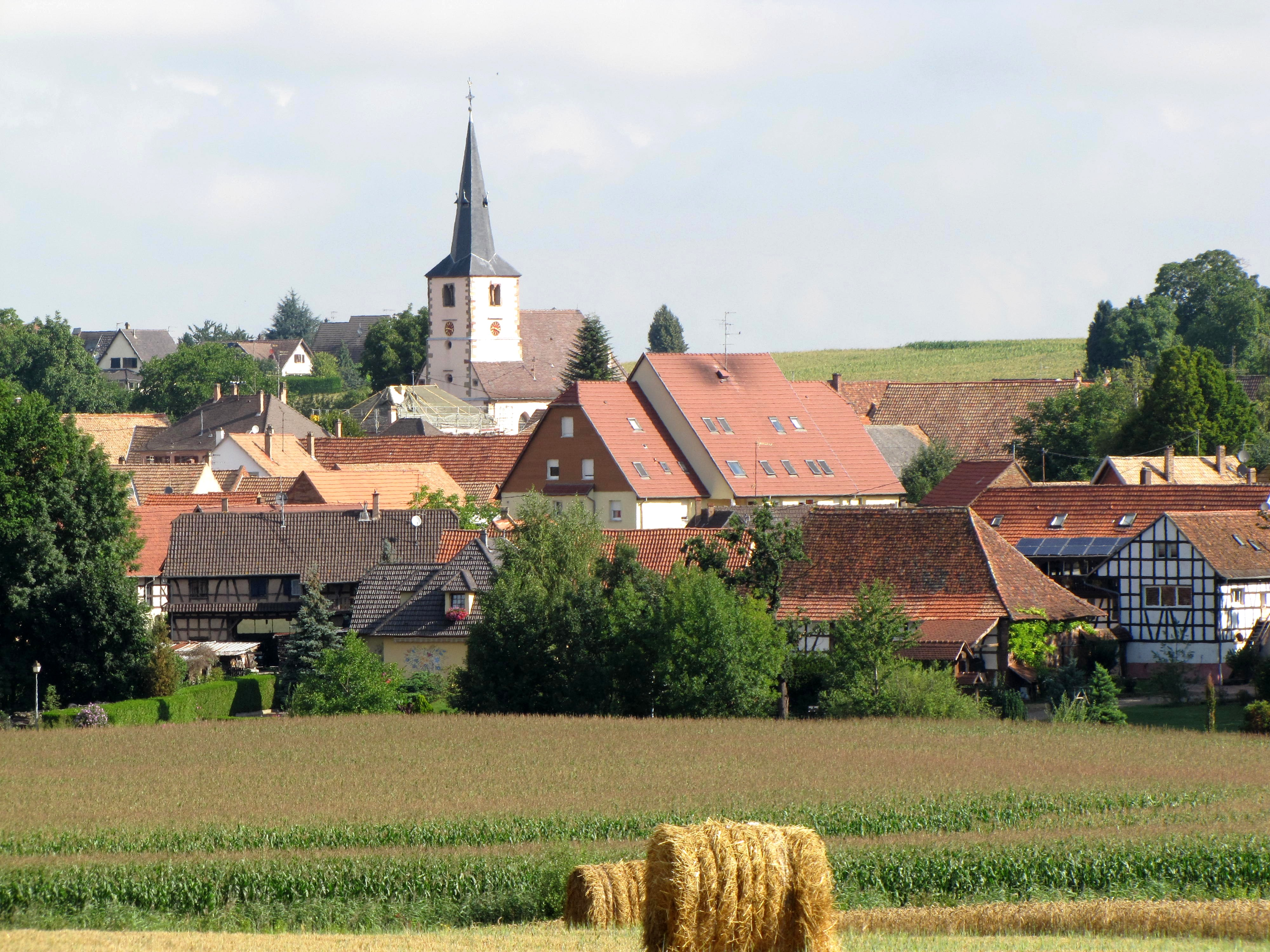 Alsace, Bas-Rhin, Berstett, Vue sur le village